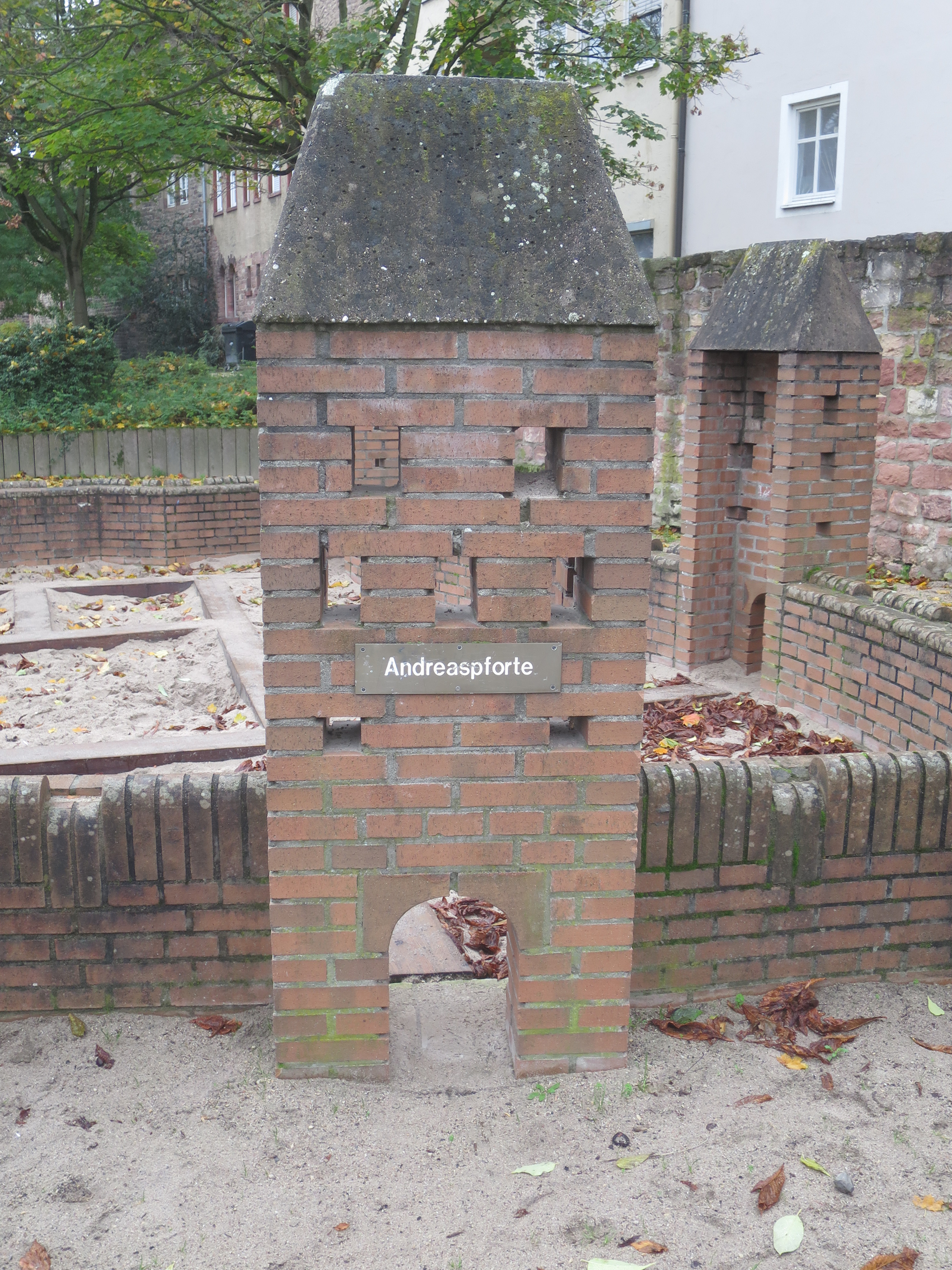 "Andreastor" der nachgebauten Stadtnauer auf dem Spielplatz in der Herta-Mansbacher-Anlage, Worms